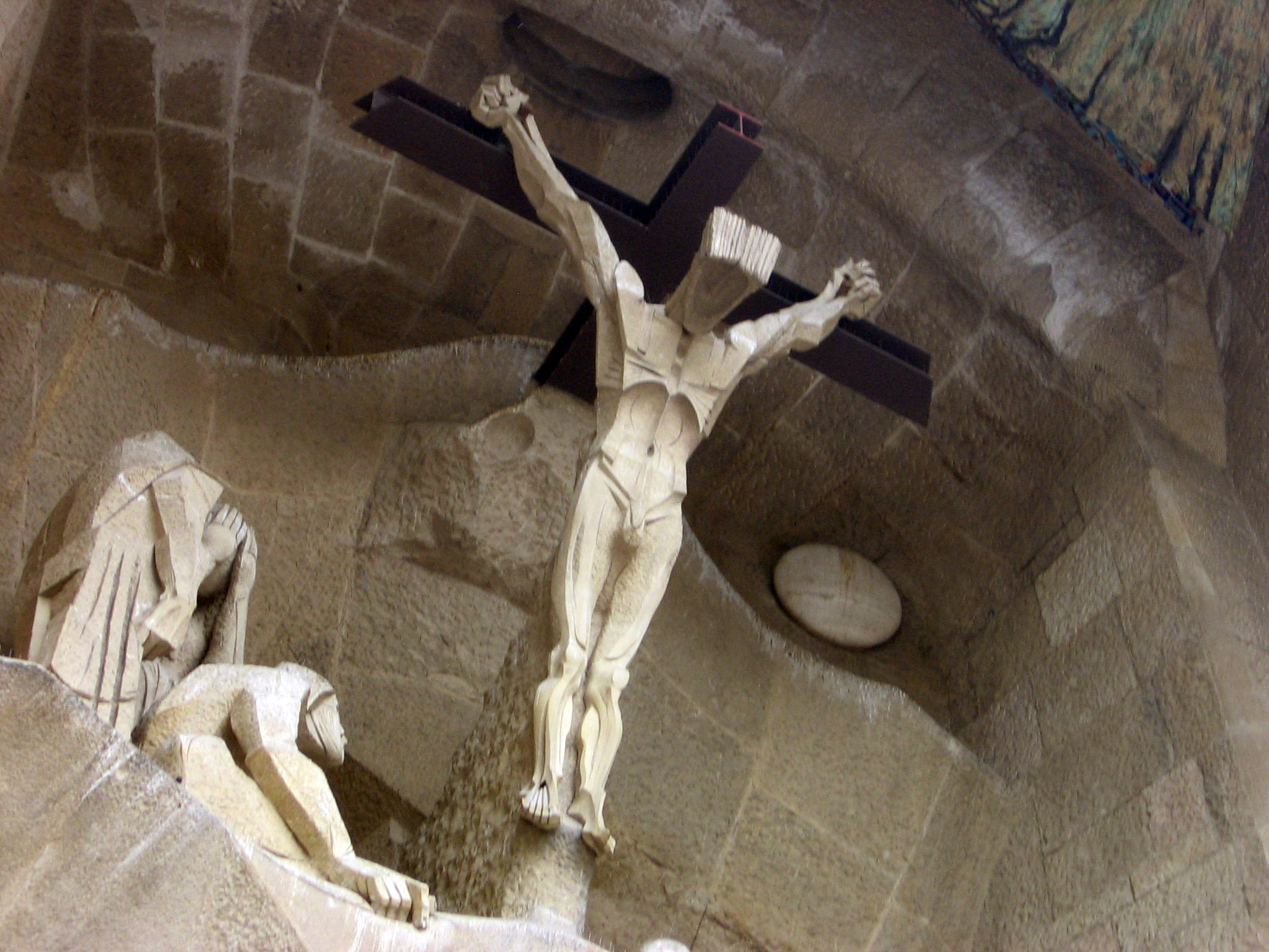 Crucifixión, de Subirachs, Sagrada Familia.